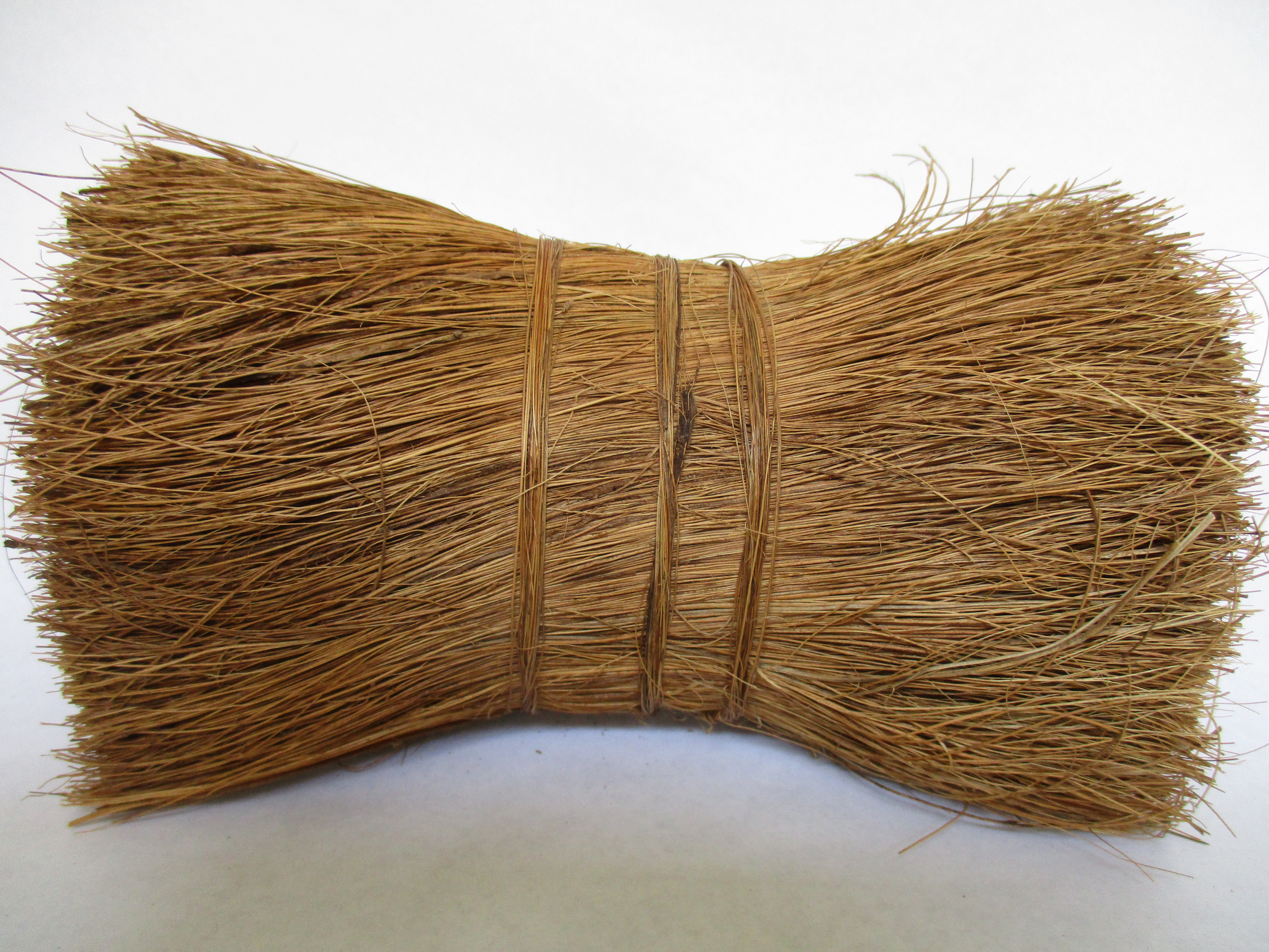 Botte de fibre de noix de coco